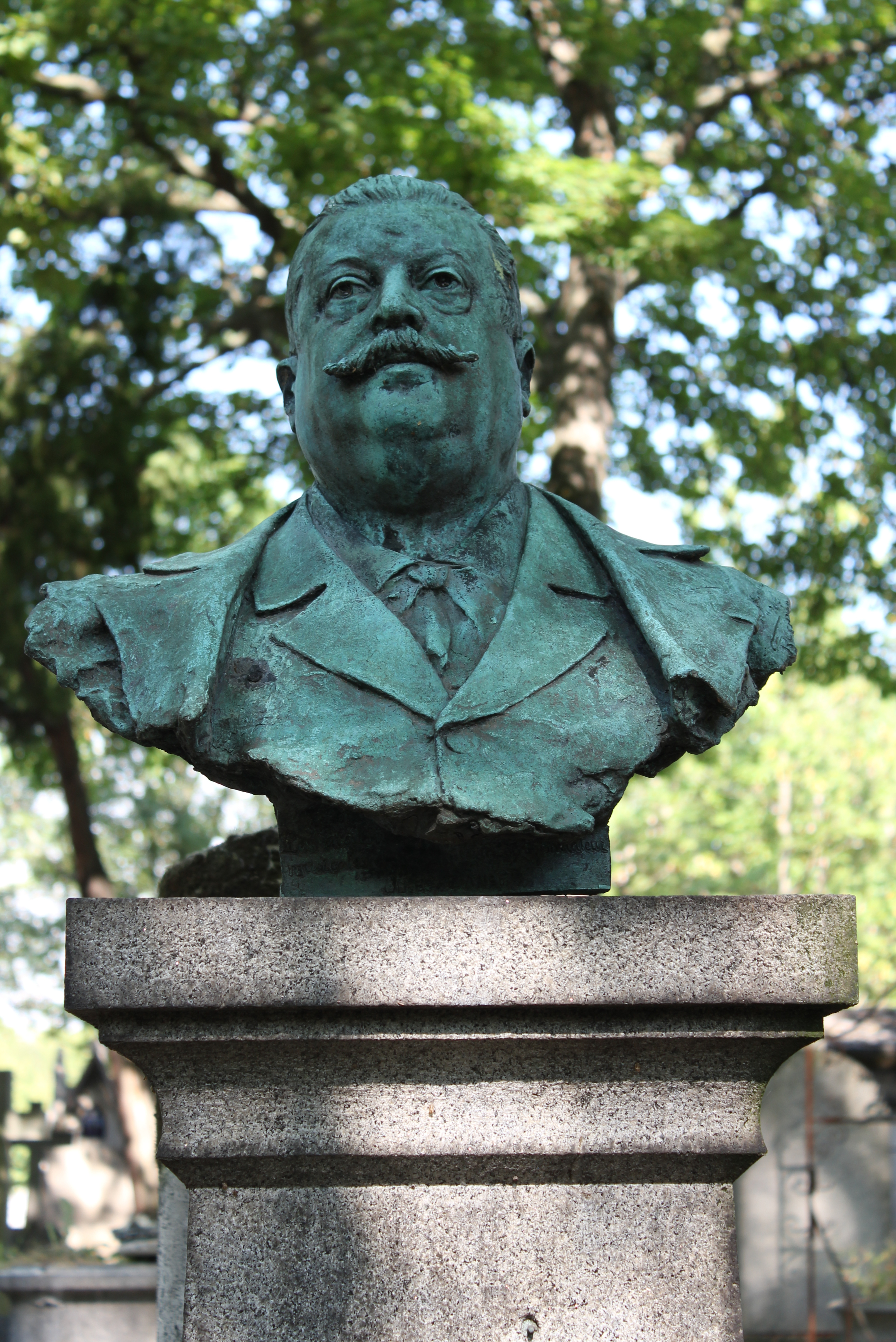 Sépulture de Jules Danbé (1840-1905), violoniste, chef d'orchestre et compositeur. Stèle sur laquelle repose un buste en bronze réalisé par Récipon et commandé par la Société des Matinées-Danbé.